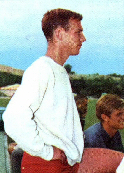 Tom Farrell, mezzofondista statunitense